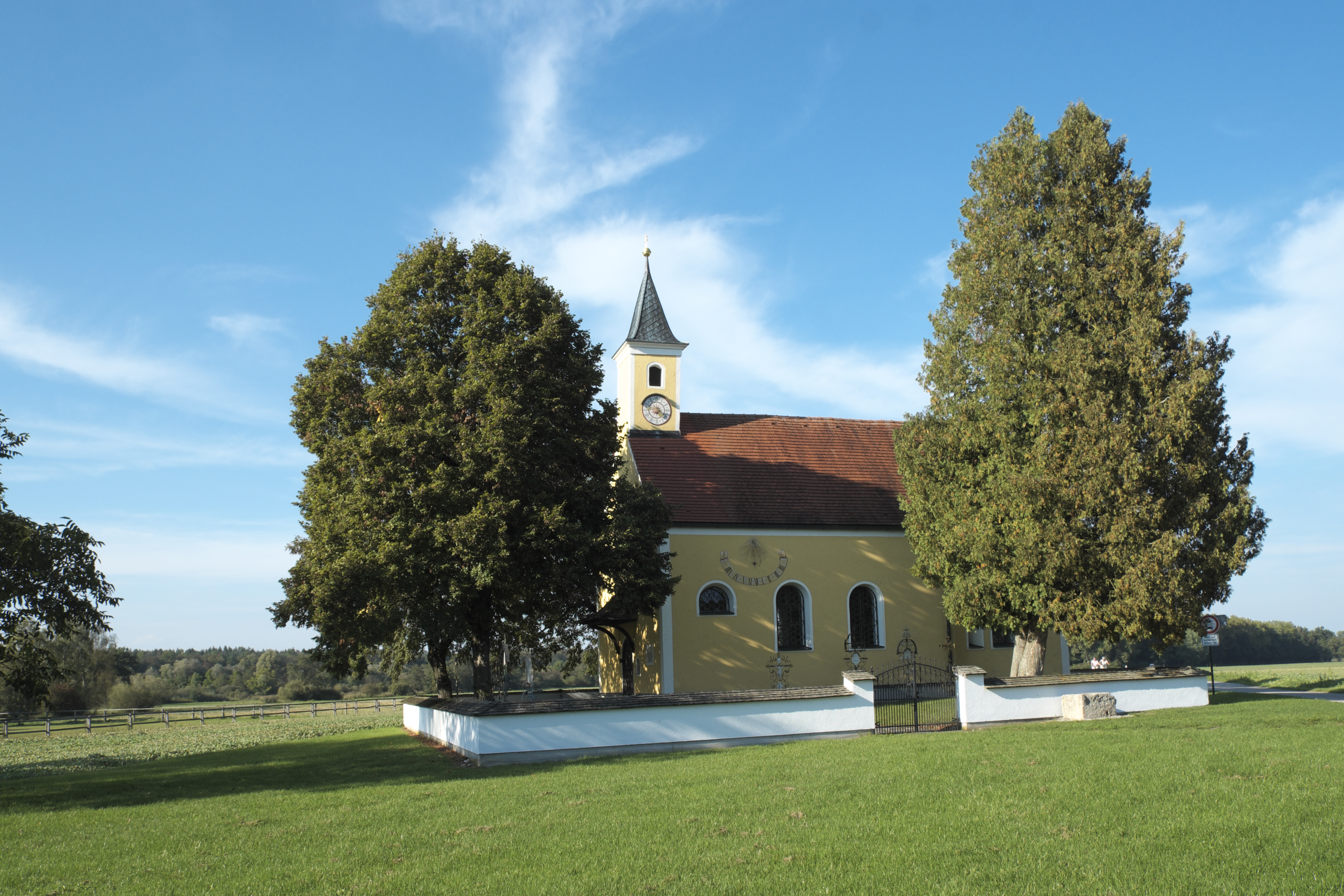 Katholische Kapelle St. Vitus in Zellhof (Schöngeising) im Landkreis Fürstenfeldbruck (Bayern/Deutschland)